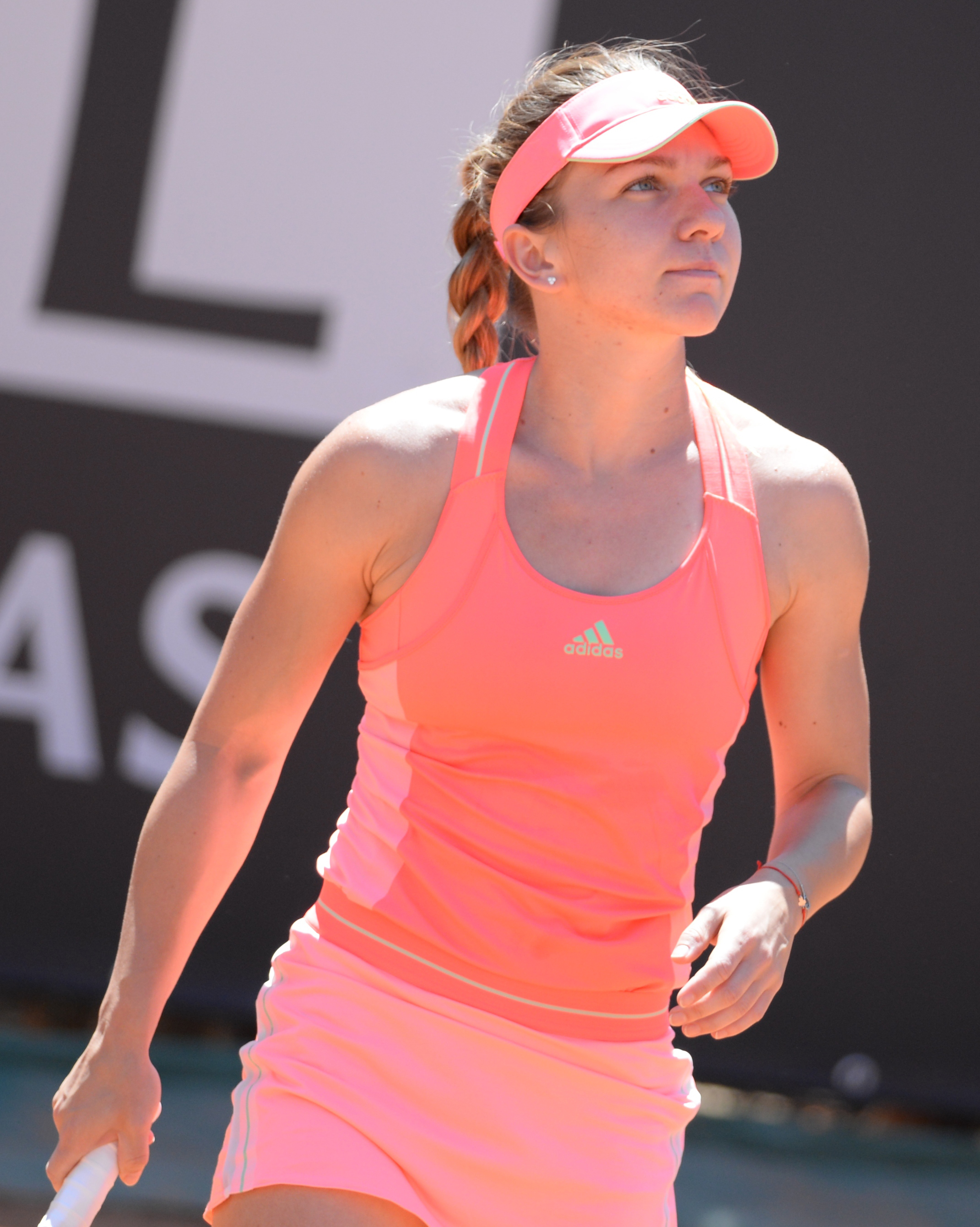 Simona Halep